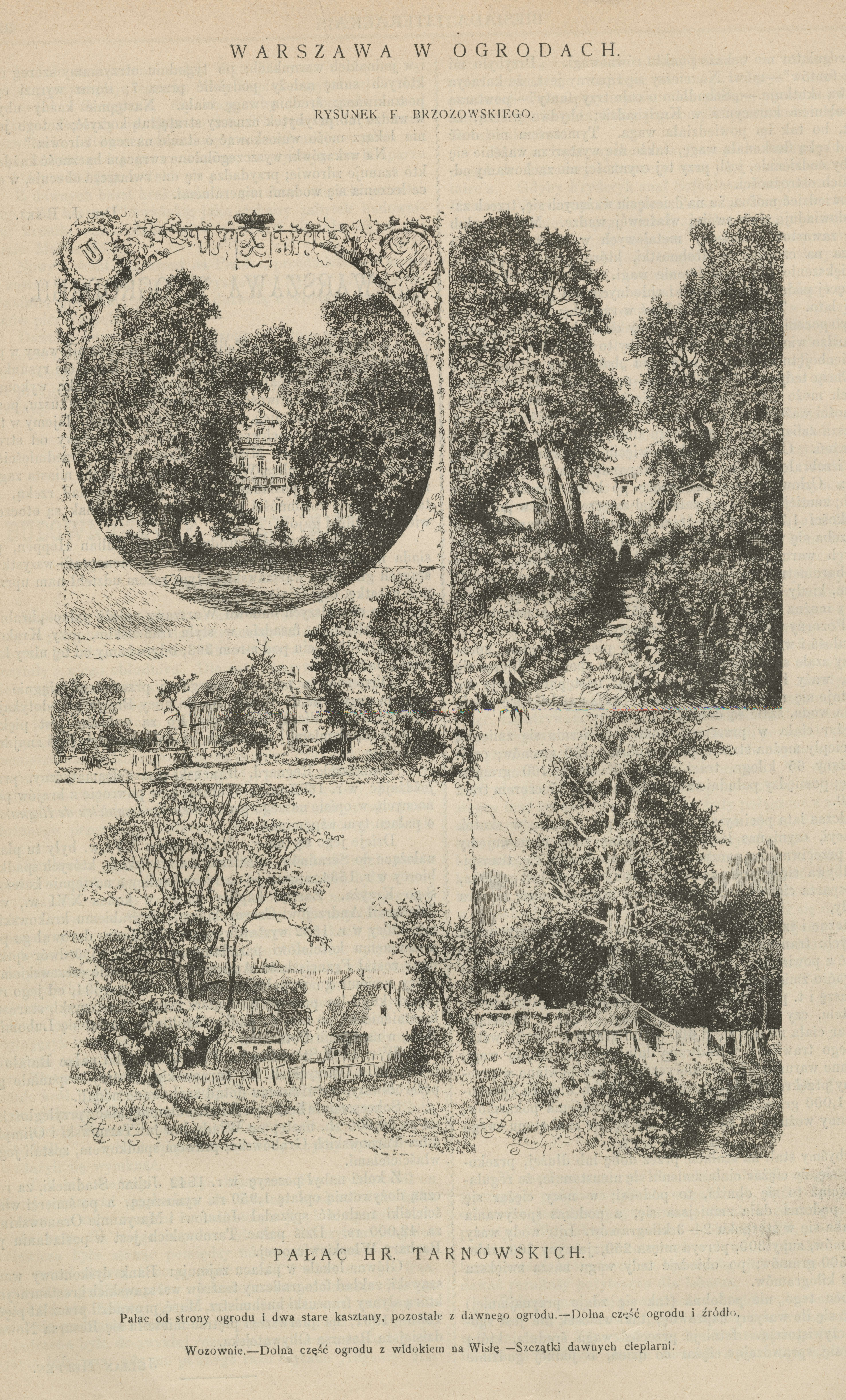 Warszawa w ogrodach : Pałac hr. Tarnowskich : Dolna część ogrodu i źródło : Wozownie : Dolna część ogrodu z widokiem na Wisłę : Szczątki dawnych cieplarni